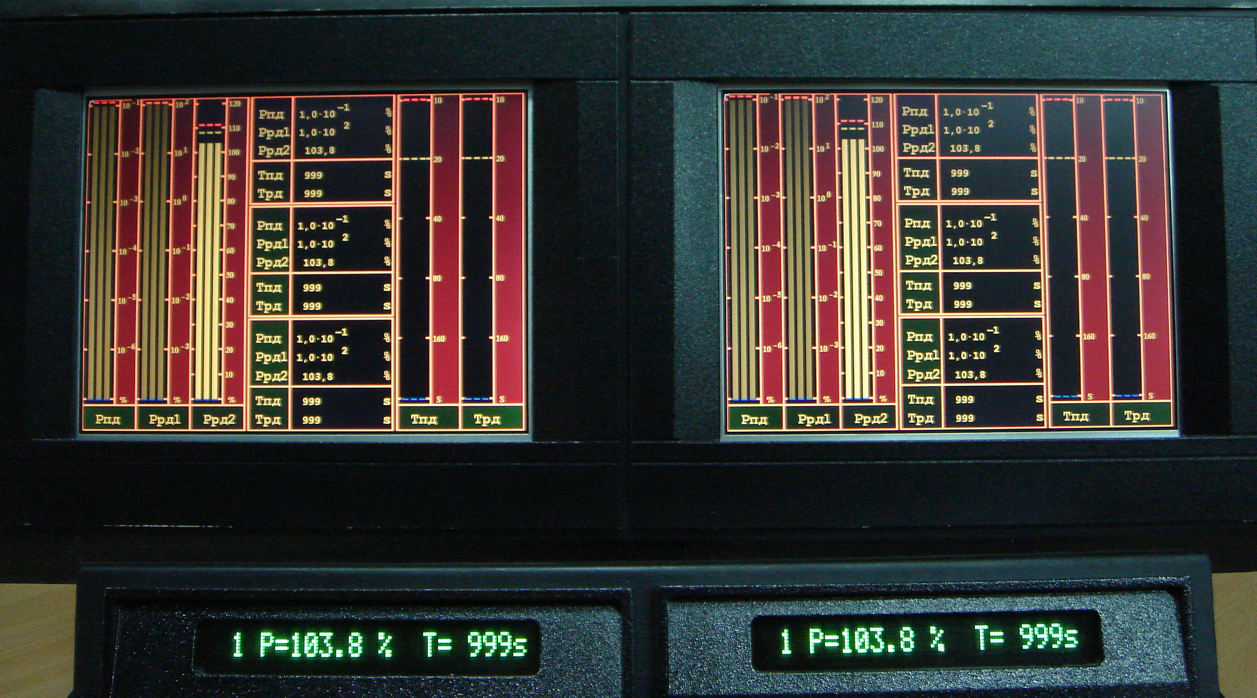 Визуальное отображение параметров аппаратурой контроля нейтронного потока реактора ВВЭР-1000 (элемент полномасштабного тренажёра БЩУ, идентичный реальному оборудованию)